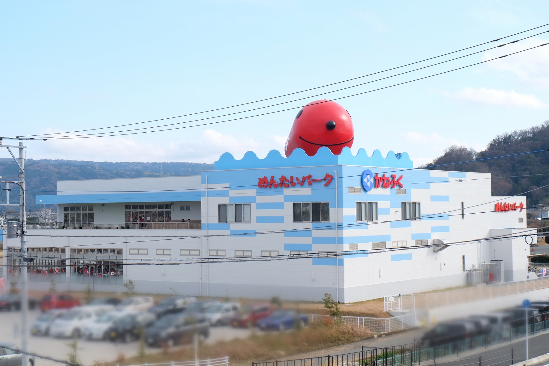 めんたいパーク伊豆の外観